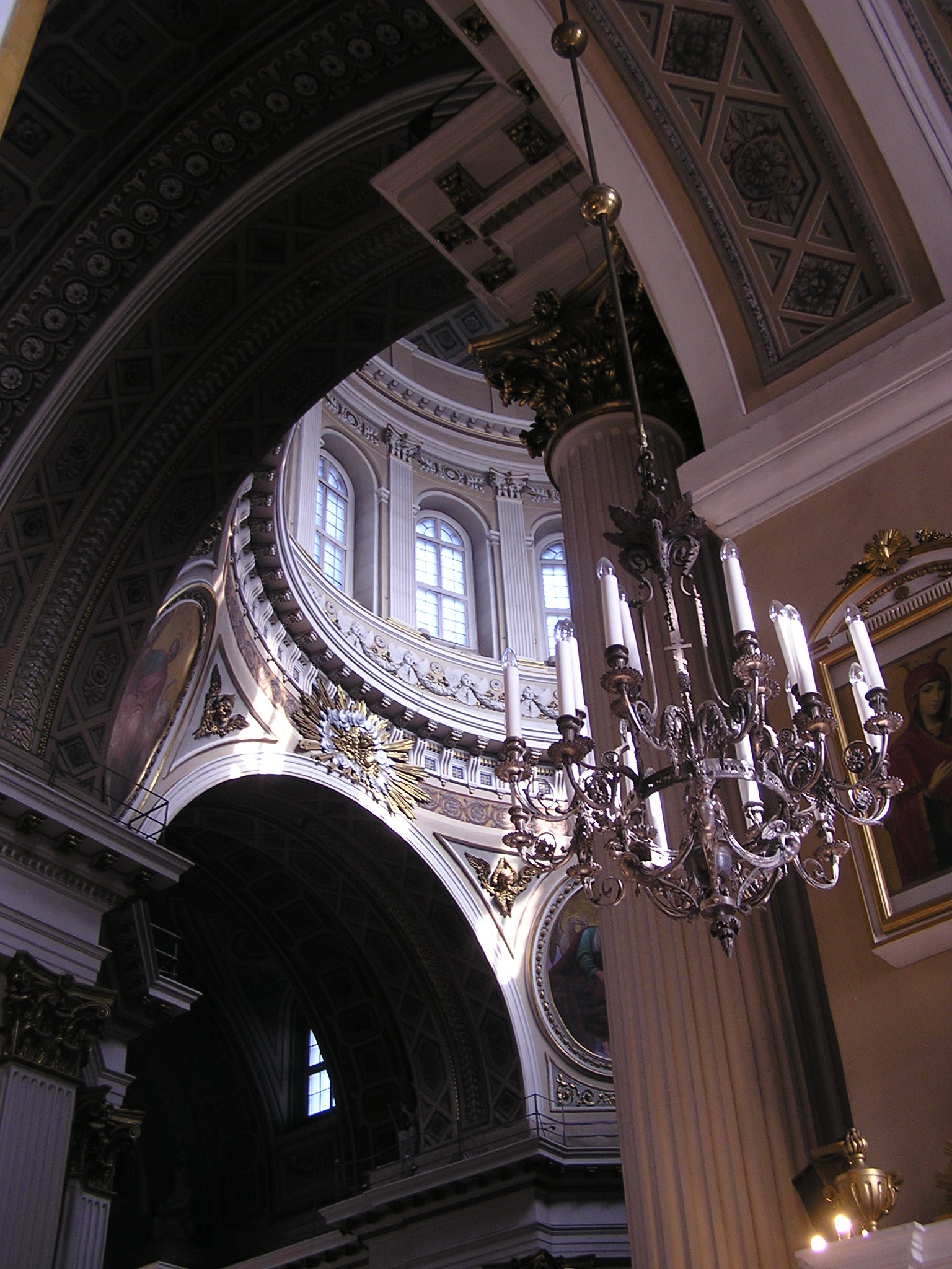 Санкт-Петербург. Александро-Невская лавра